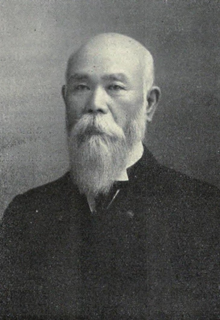 大谷嘉兵衛